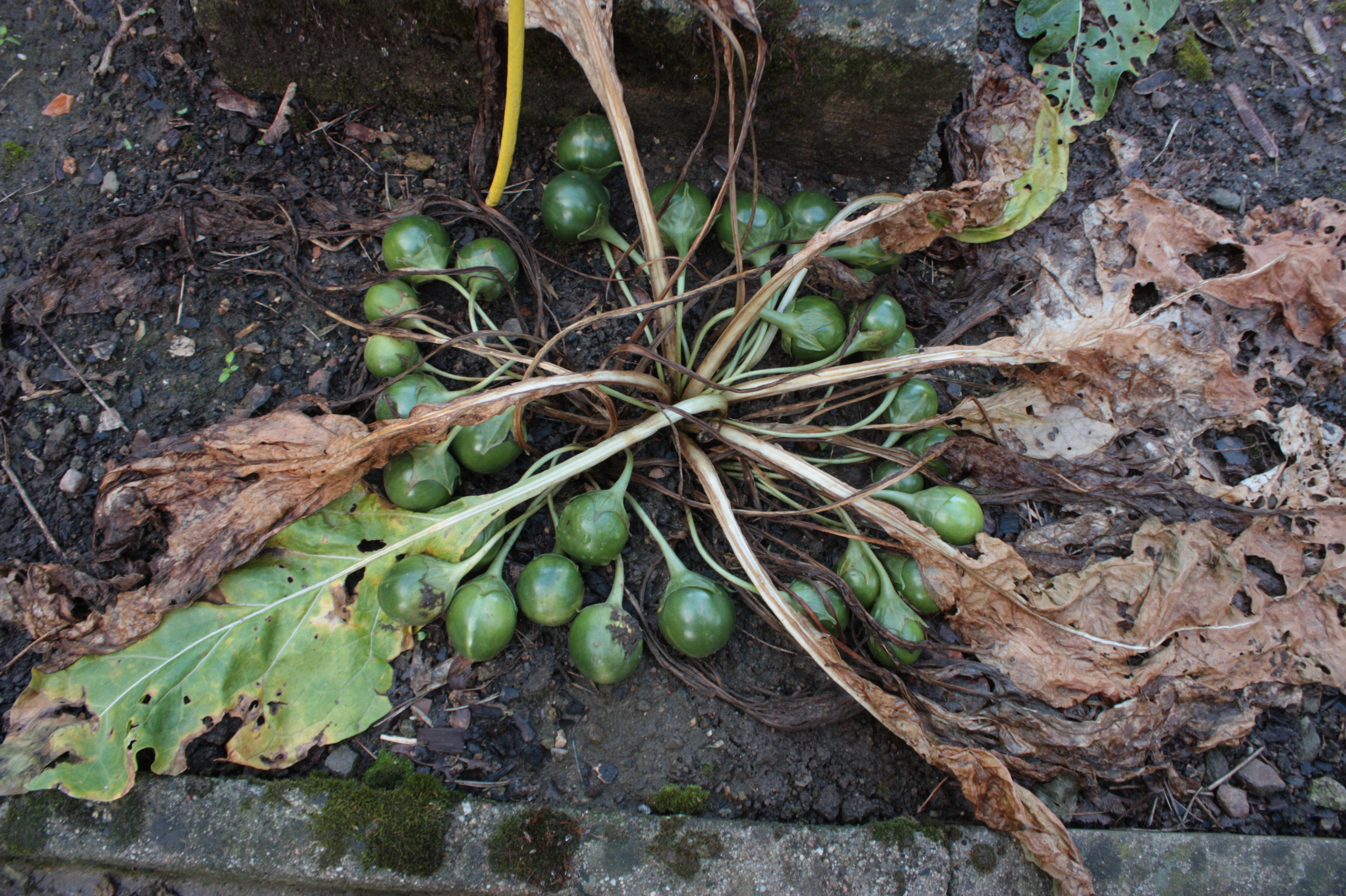 Botanická zahrada Brno Kravi hora, Mandragora officinarum, plody, červen.